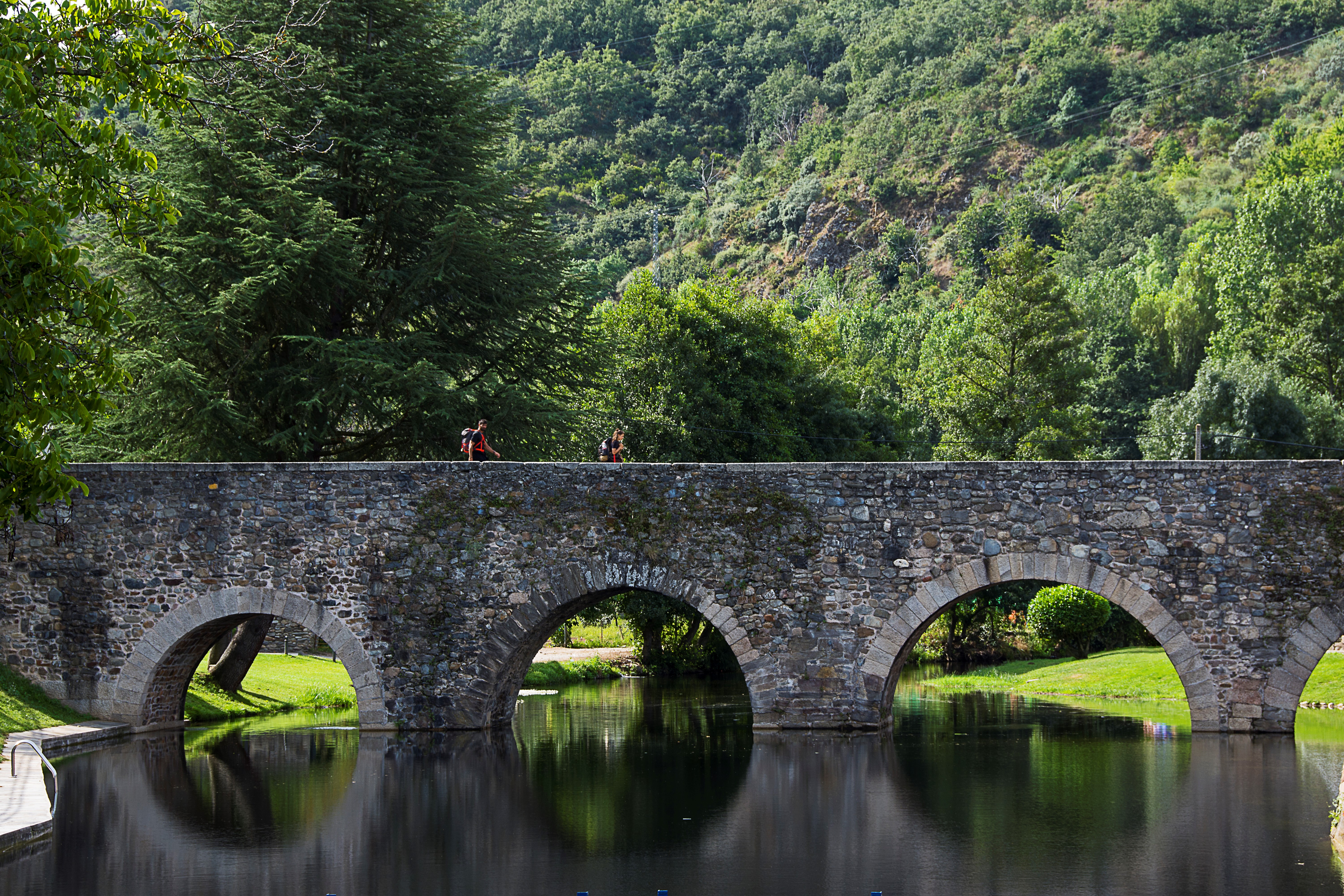 Puente de los peregrinos sobre el río Meruelo, en Molinaseca.